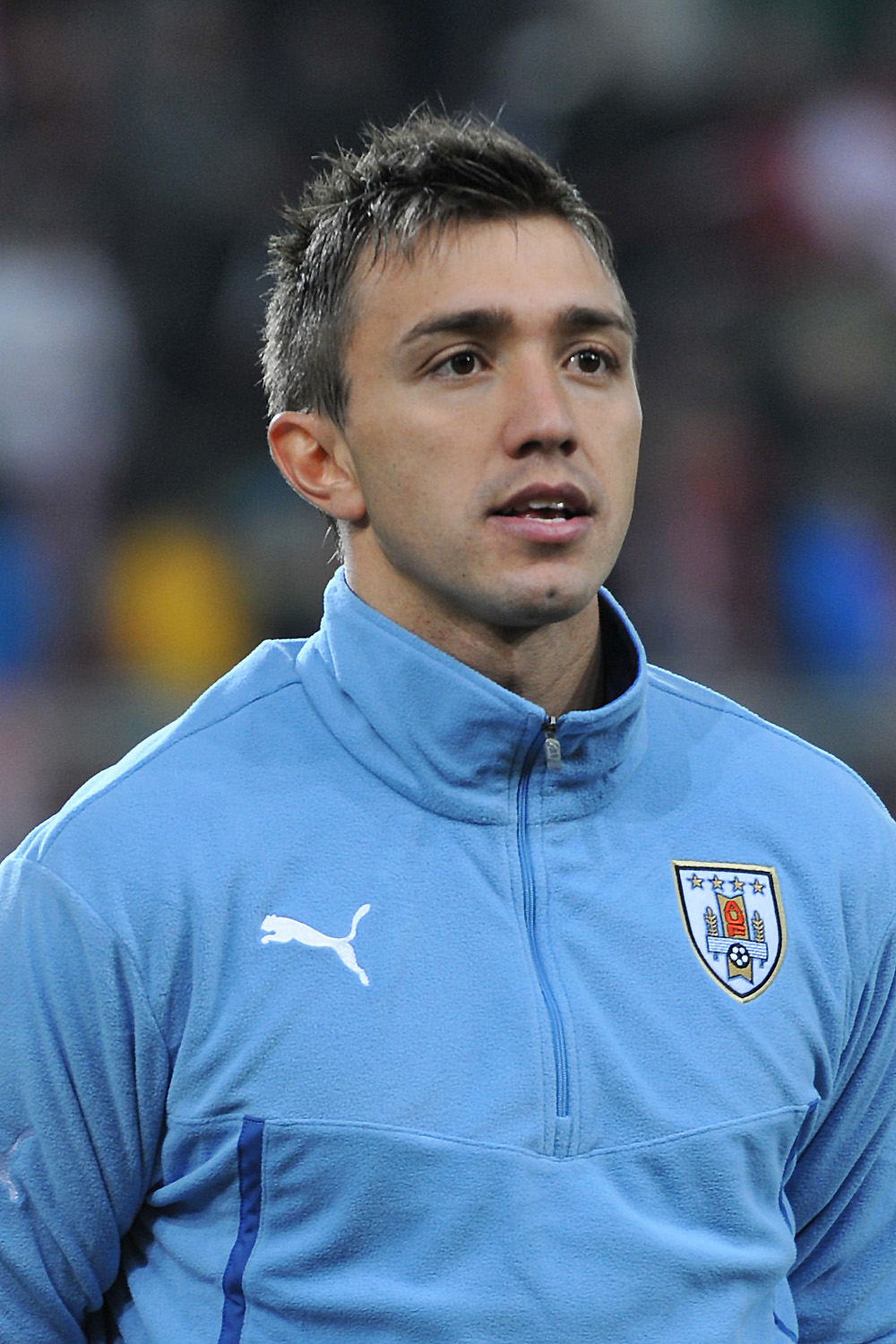 Freundschaftliches Länderspiel Österreich - Uruguay am 5. März 2014 in Klagenfurt: Fernando Muslera